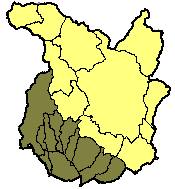 IT: In marrone si notano i comuni facenti parte della Valdinievole, all'interno della provincia di Pistoia. EN: Shown in brown, there are the communes of Valdinievole, inside the Province of Pistoia